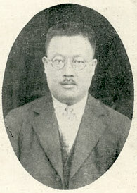 Bân-lâm-gú: Âng Hóe-liān (洪火煉)